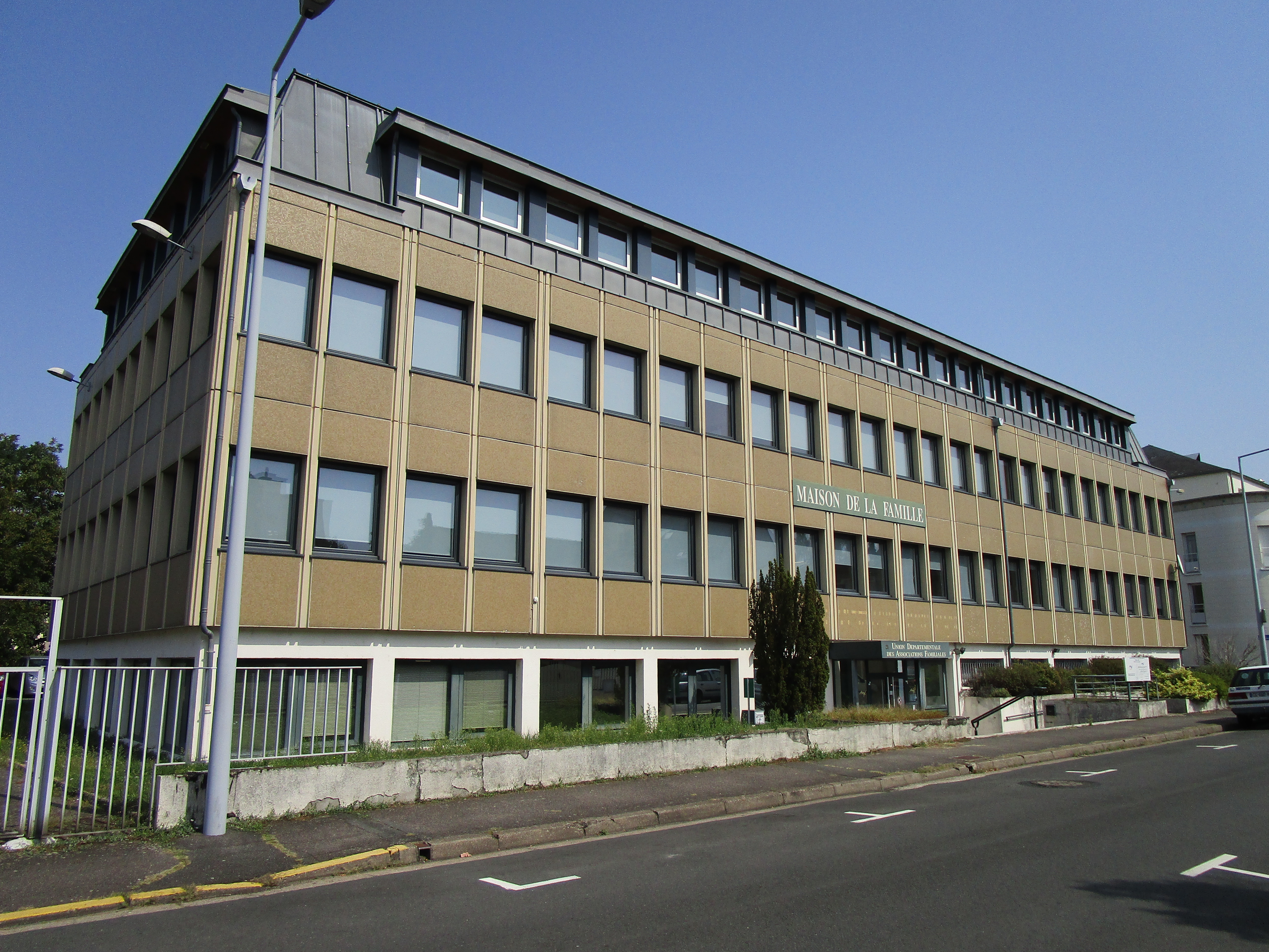 La maison de la famille (siège de l'Union départementale des associations familiales), rue de Beaumont, dans le quartier Rabelais-Tonnellé